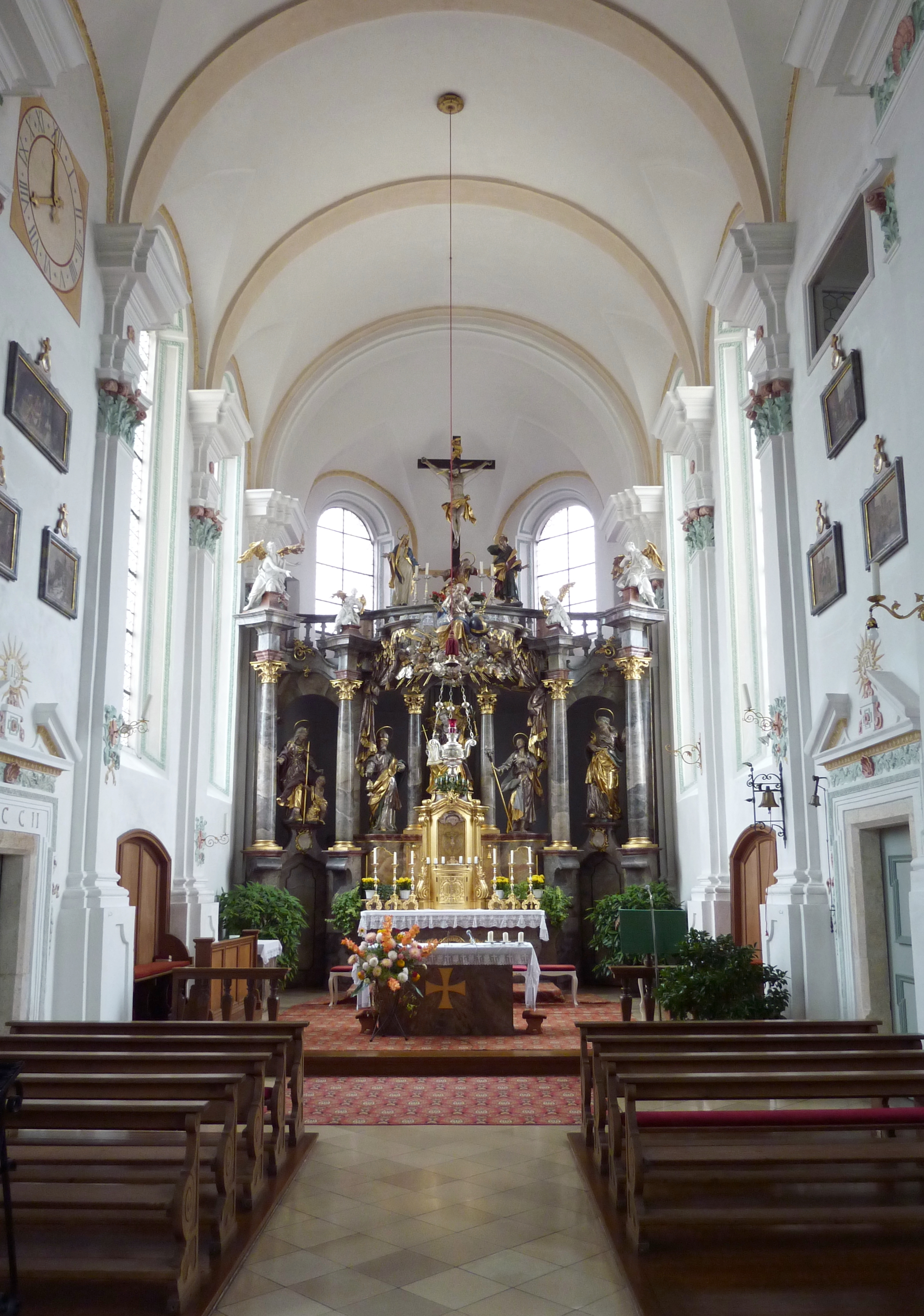 Katholische Pfarr- und Wallfahrtskirche Unsere Liebe Frau im Moos in Kicklingen (Dillingen an der Donau), Innenansicht mit Blick zum Chor